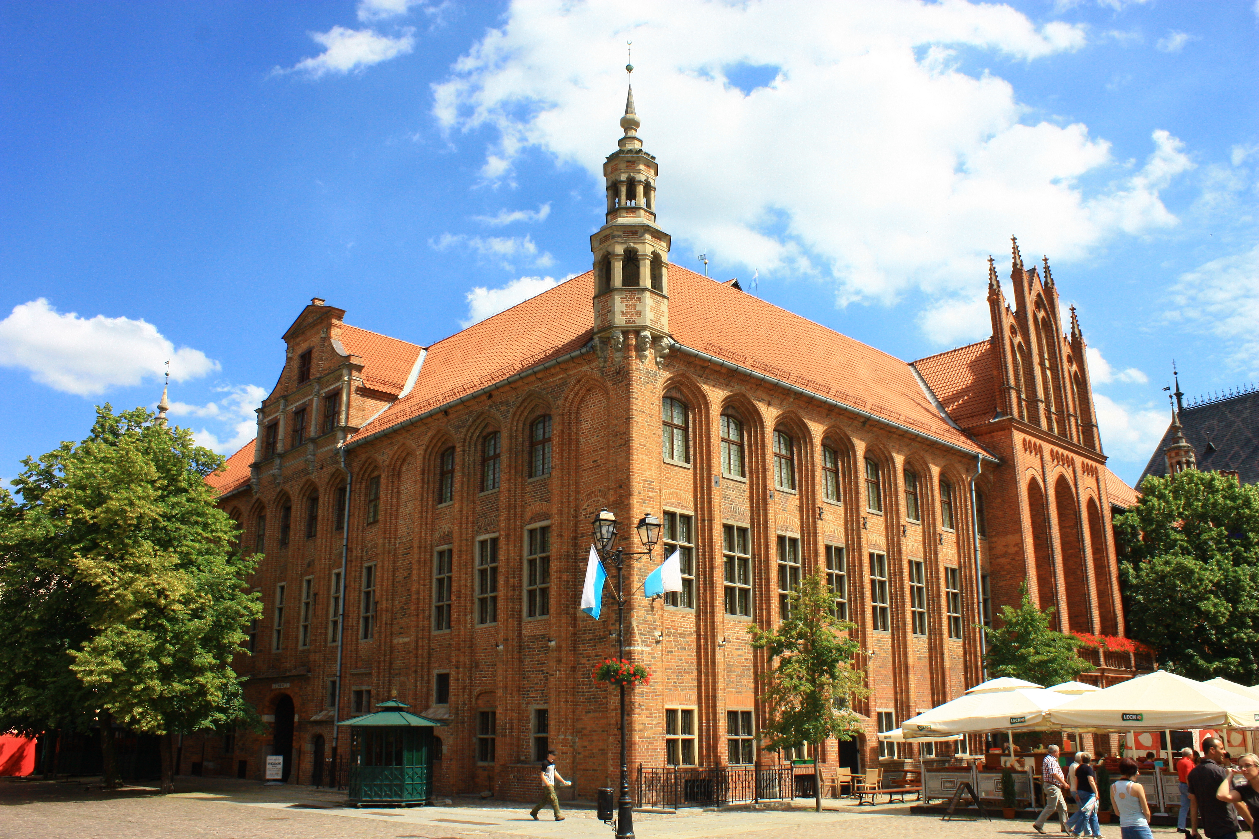 Toruń, ratusz staromiejski, ob. Muzeum Okręgowe, 2 poł. XIII, 1391-1399, 1861